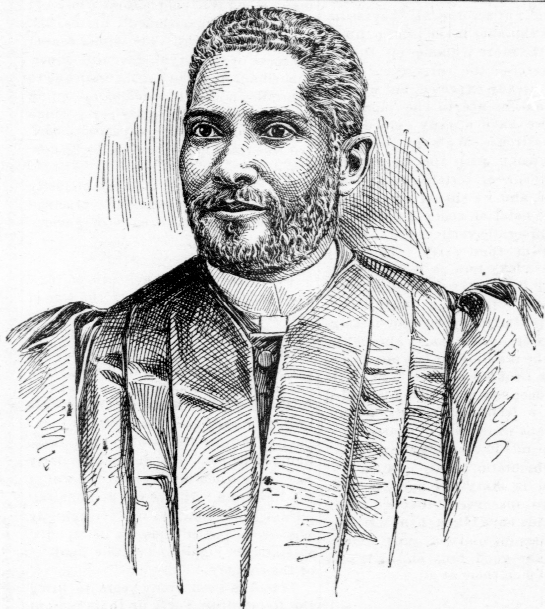 Alexander Walters circa 1900